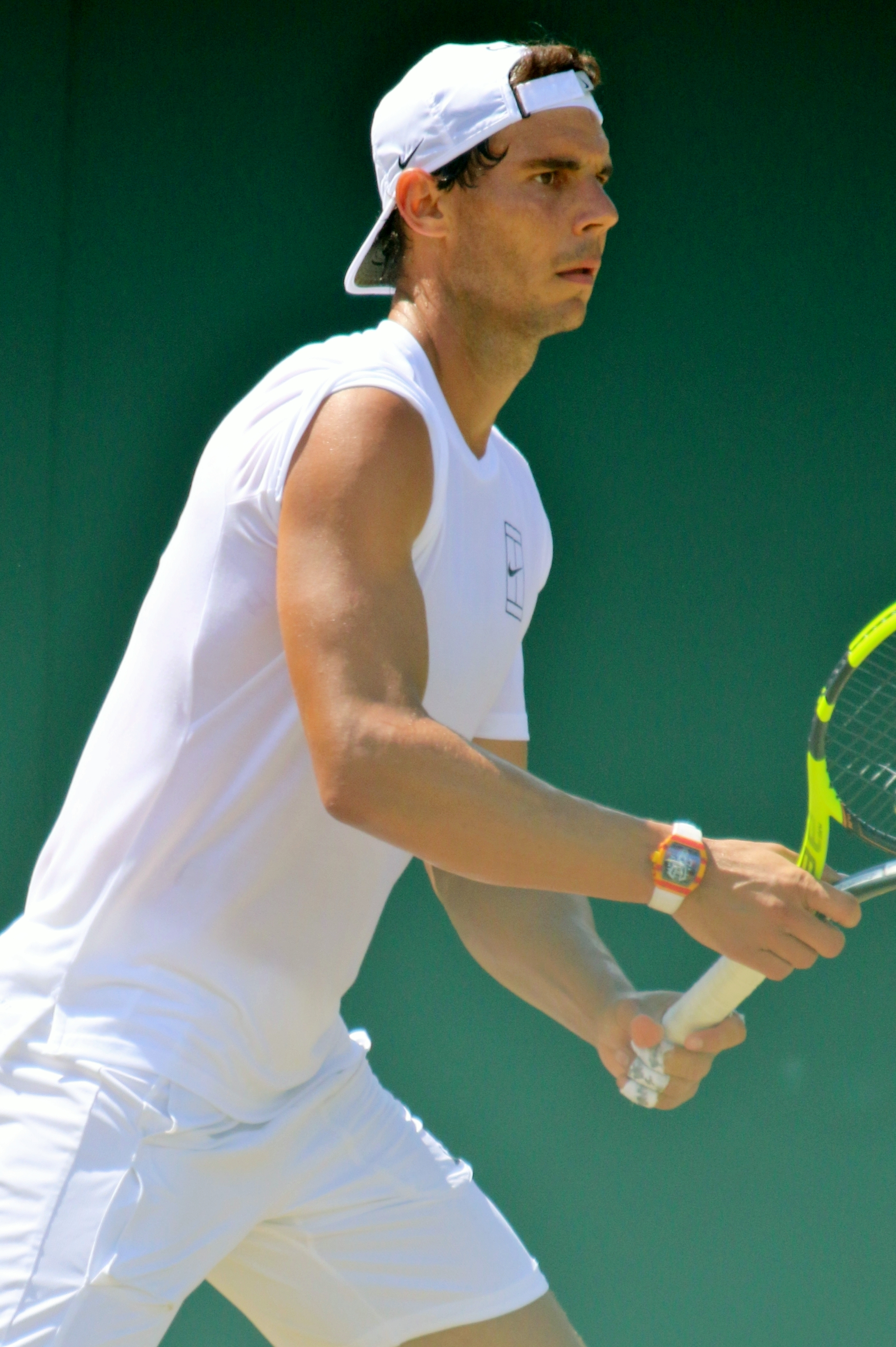 Nadal WM17 (33)